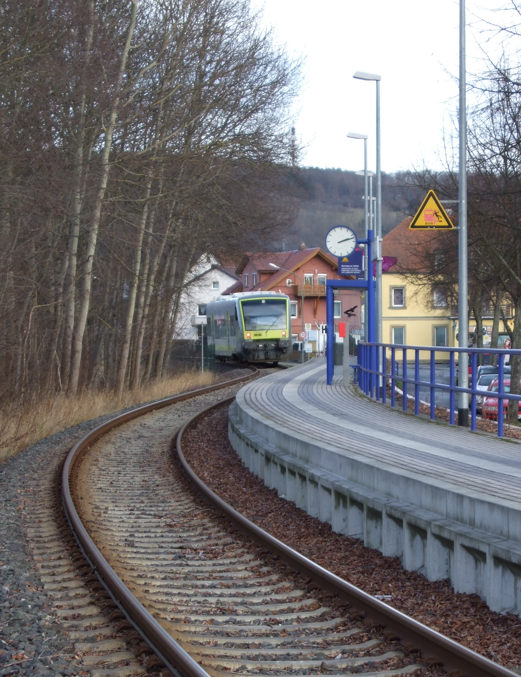 Haltepukt Laineck, Bayreuth